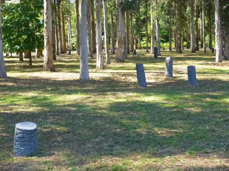 Pontevedra - Espazo Natural da Ribeira do Lérez-Illa das Esculturas